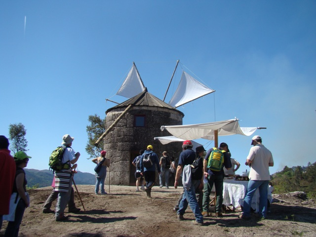 Moinho de Vento - Lugar de Gilbarbedo, Cibões - Terras de Bouro